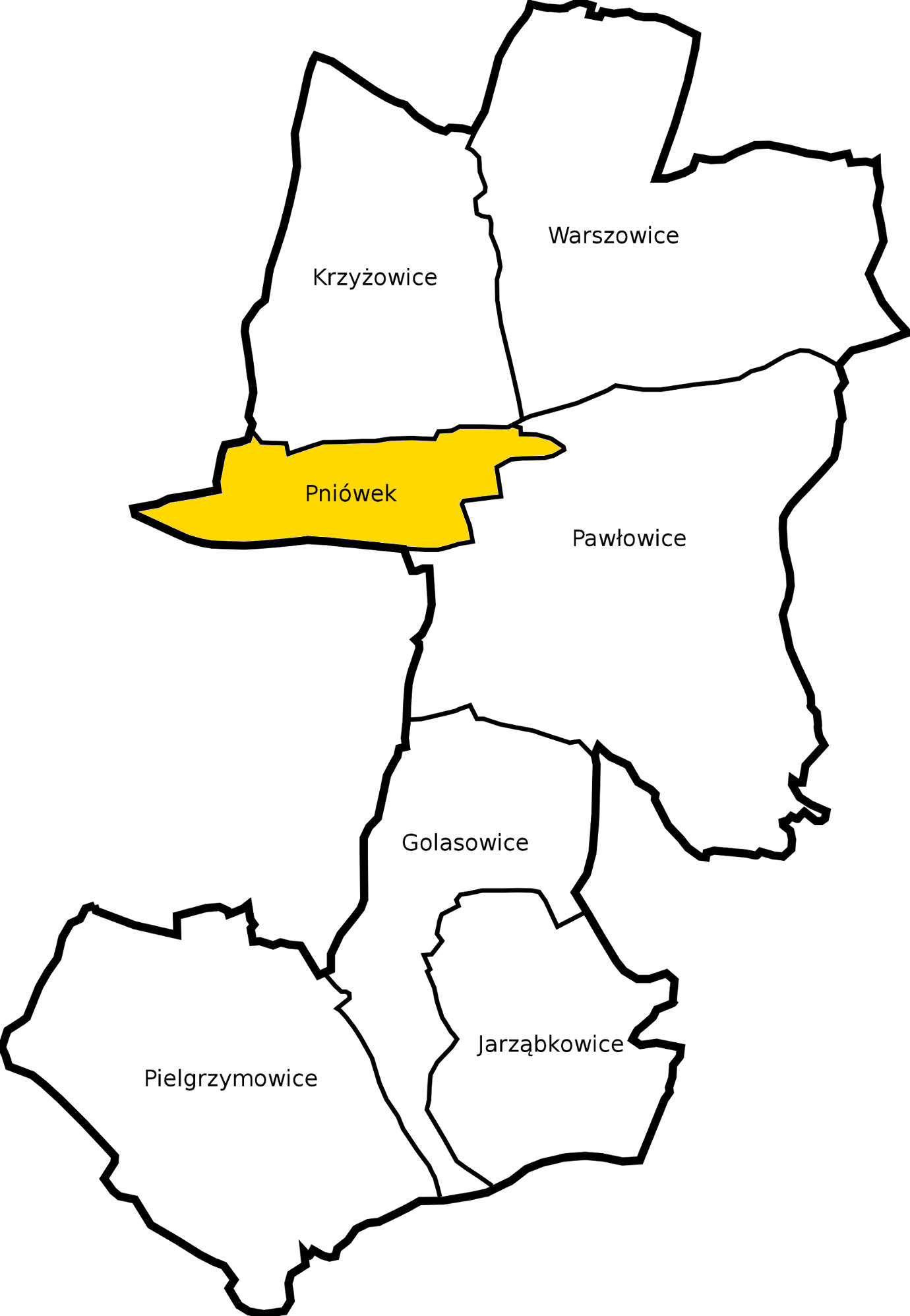 Sołectwo Pniówek na mapie gminy Pawłowice